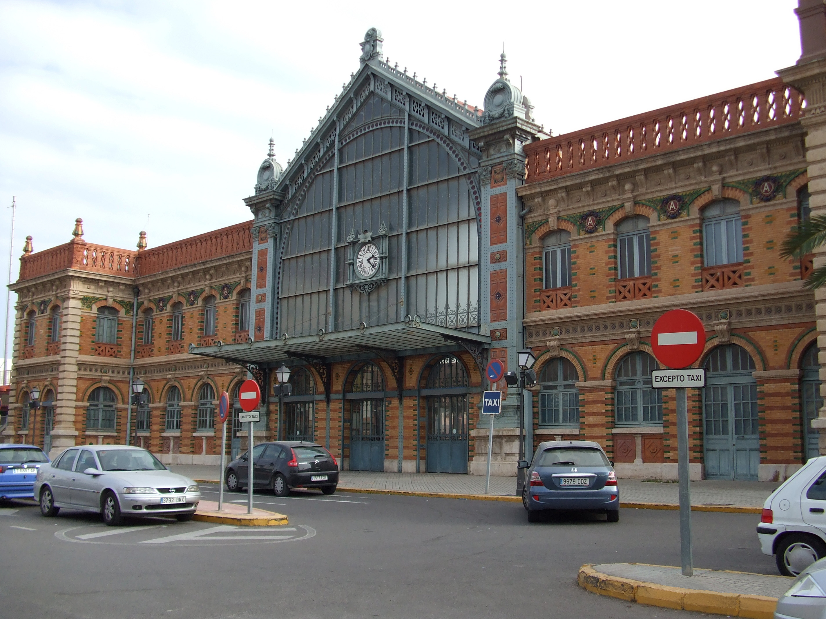 Antigua estación de trenes de Almería